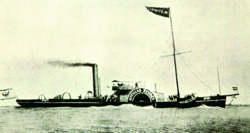 Matthias Stinnes I war der erste brauchbare Raddampfschlepper auf dem Rhein